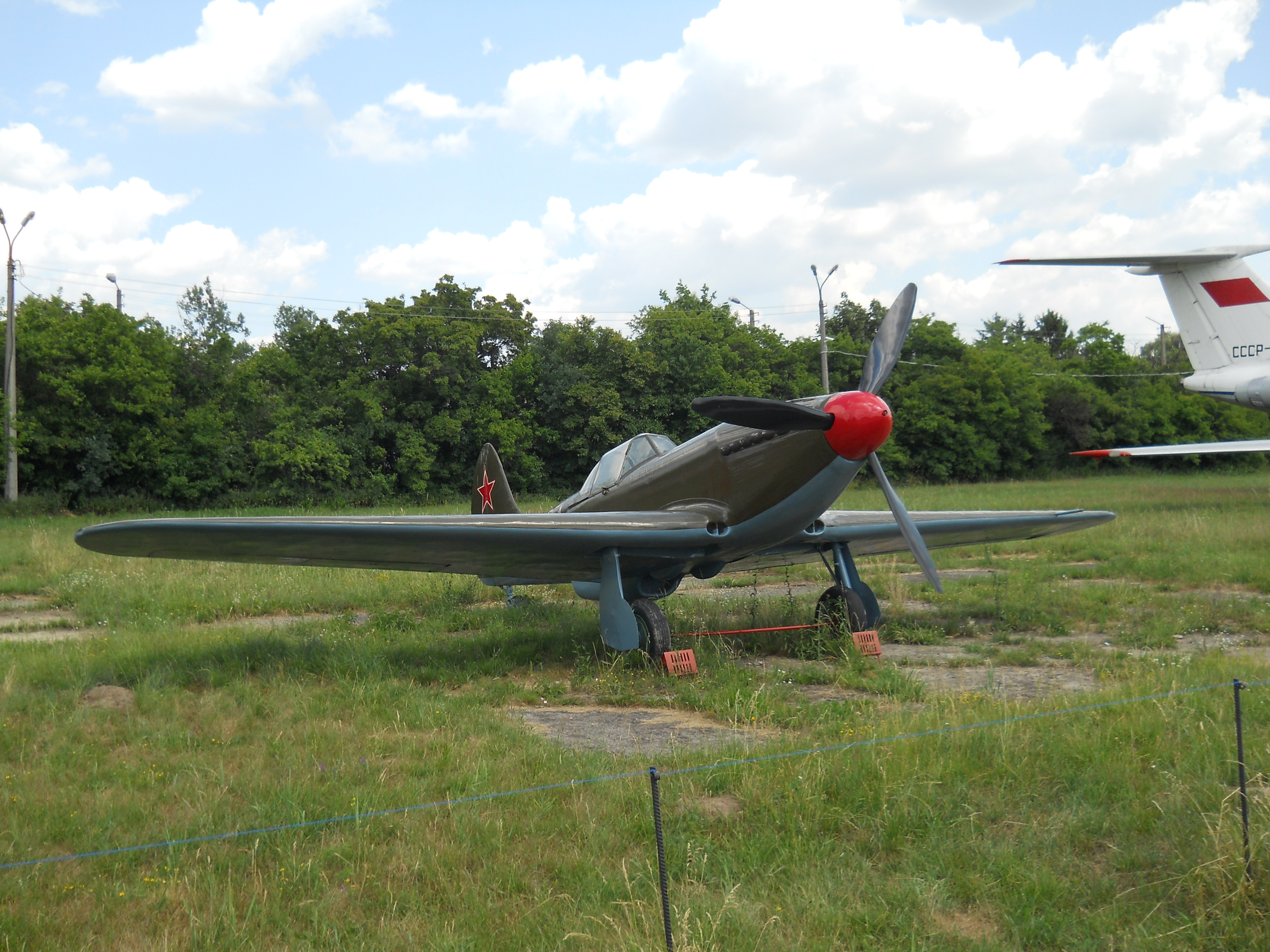 kiev ukraine 1076 state aviation museum zhulyany (13)